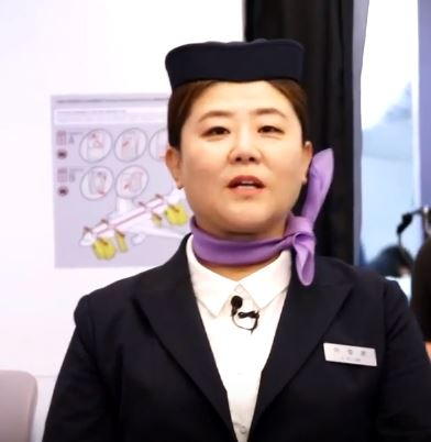 [이정은] '아모레퍼시픽-슬리핑뷰티112' 광고 비하인드 스토리